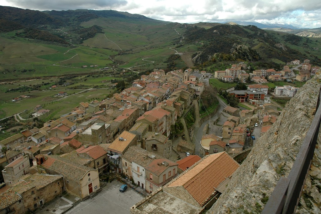 Sperlinga (EN) - Panorama